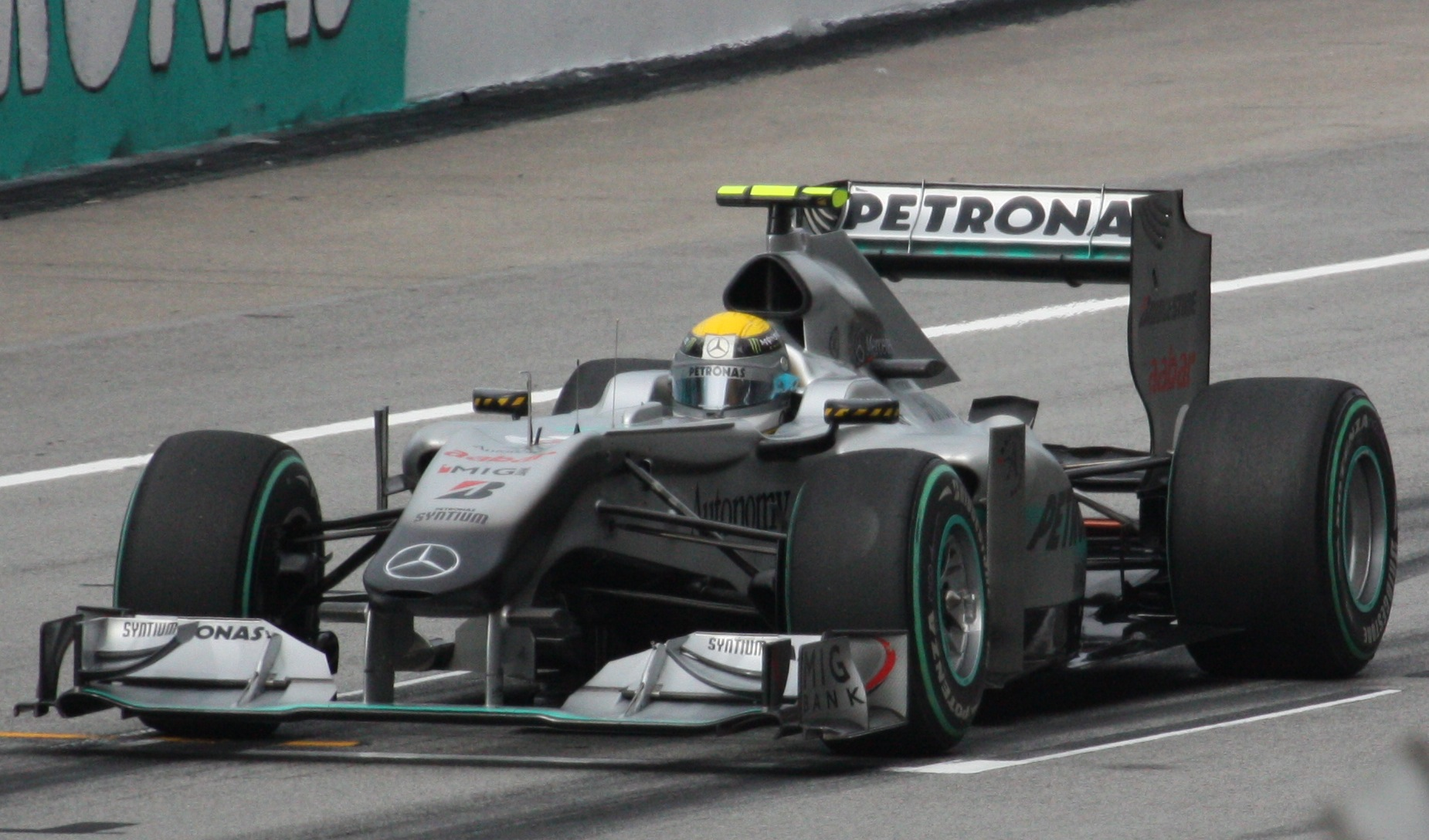 Rosberg 2010